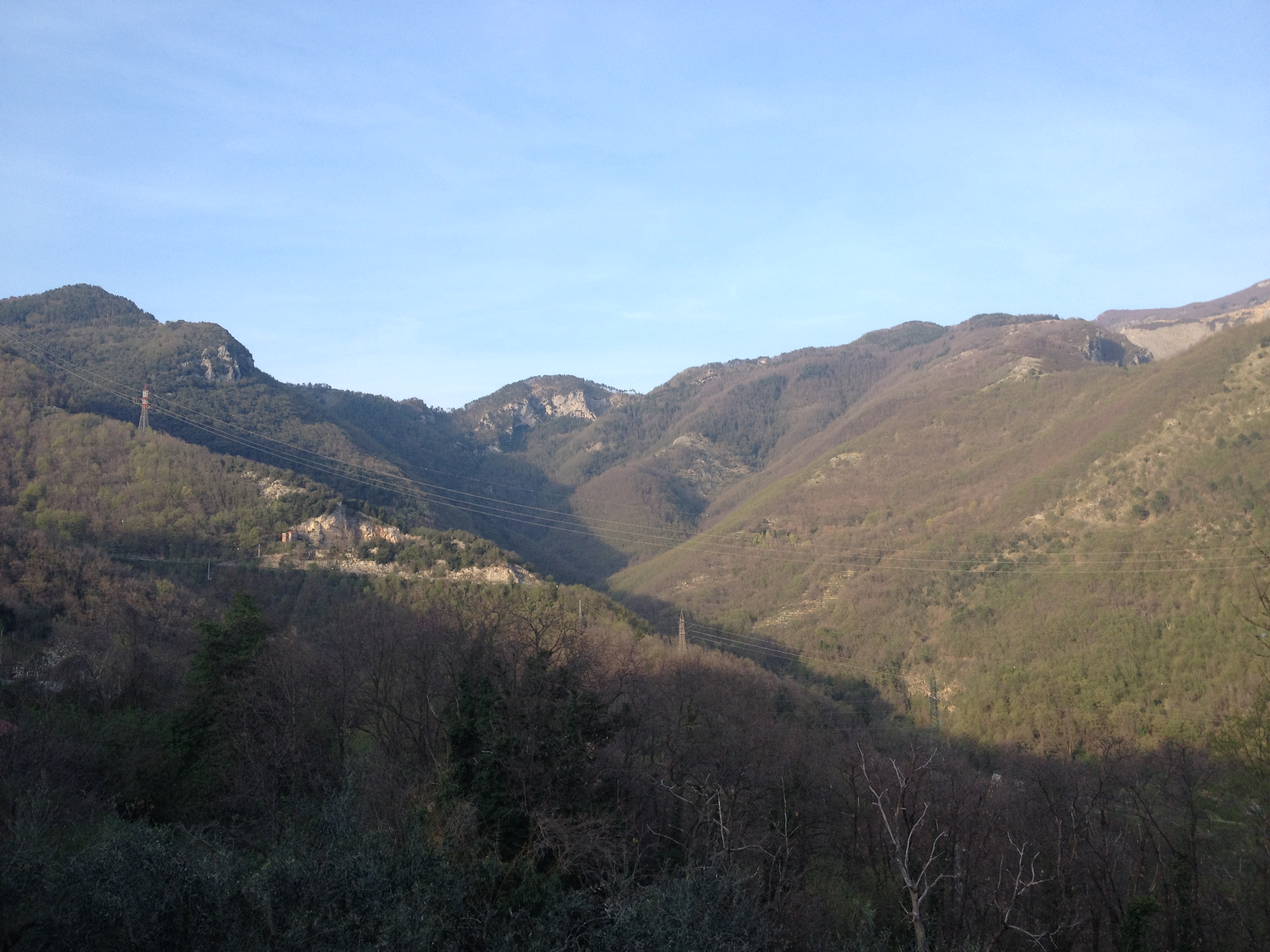 panorama view mountain